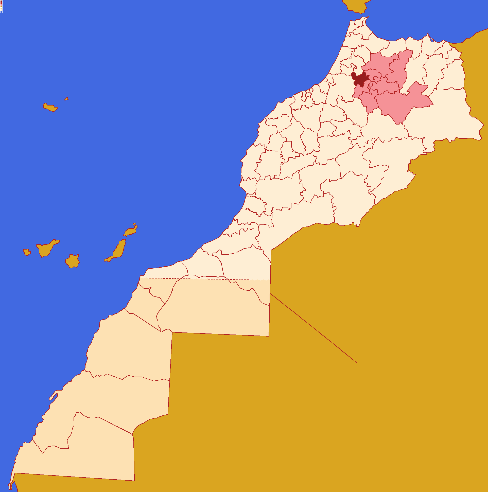 Localização da prefeitura de Meknès ,dentro da região de Fez-Meknès e dentro de Marrocos.Conforme a reforma administrativa de 2015.